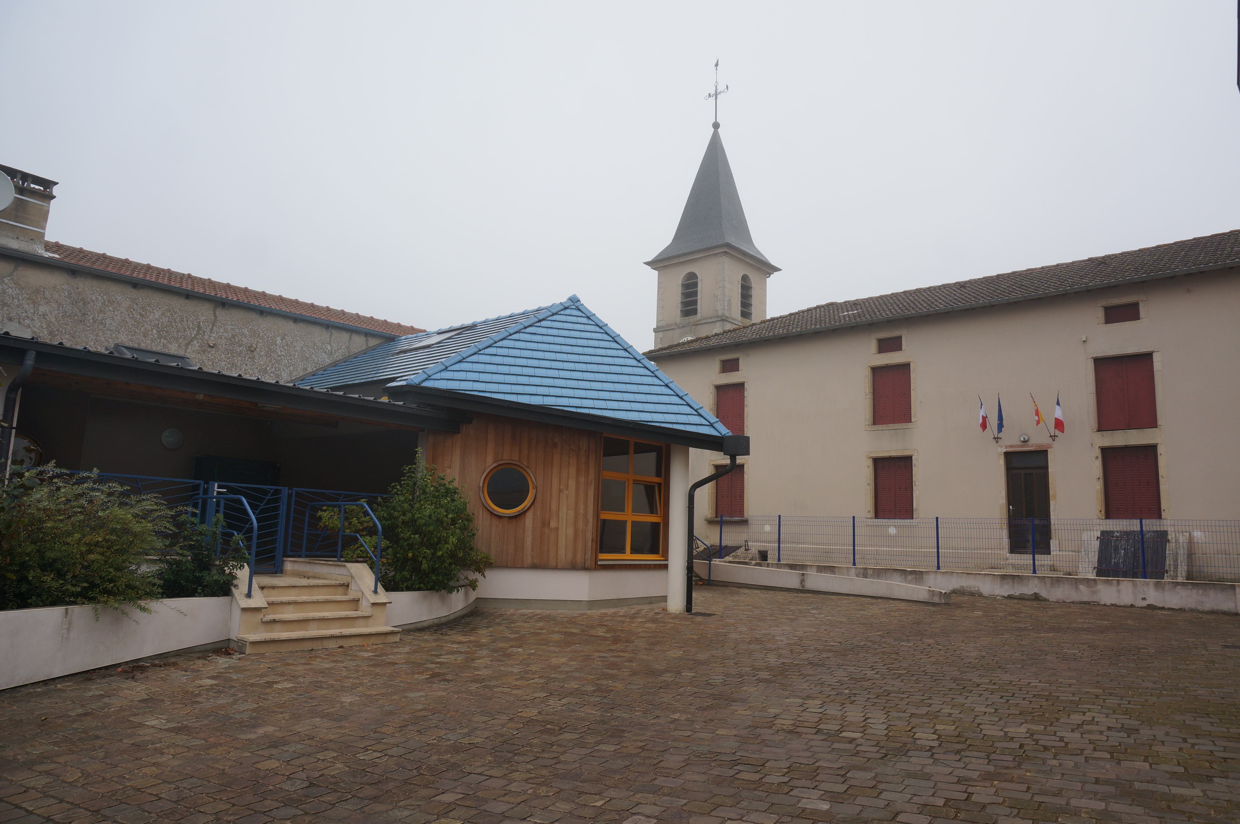 à Fontenoy vue de l'église et de la Mairie.